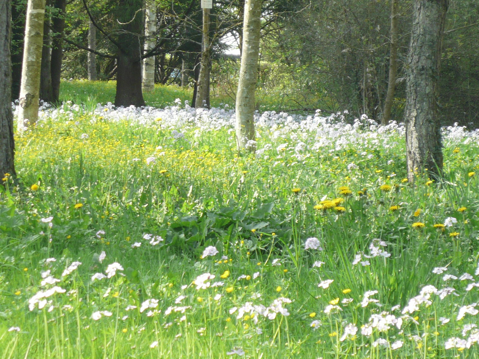 Arboretum et floraison à Bourbonne-les-Bains